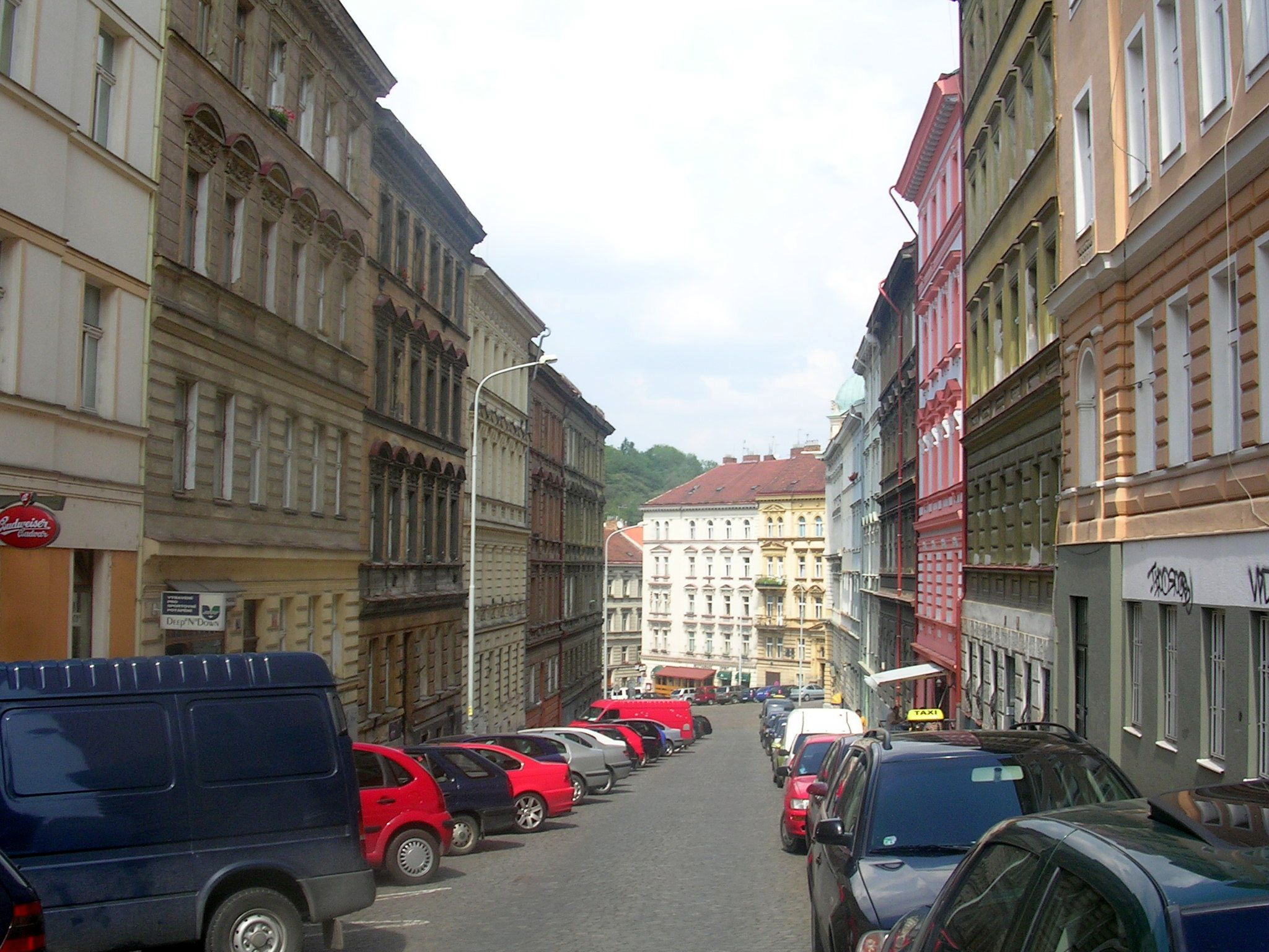 Praha, Žižkov. Blahníkova ulice, pohled od Seifertovy směr Kostnické náměstí